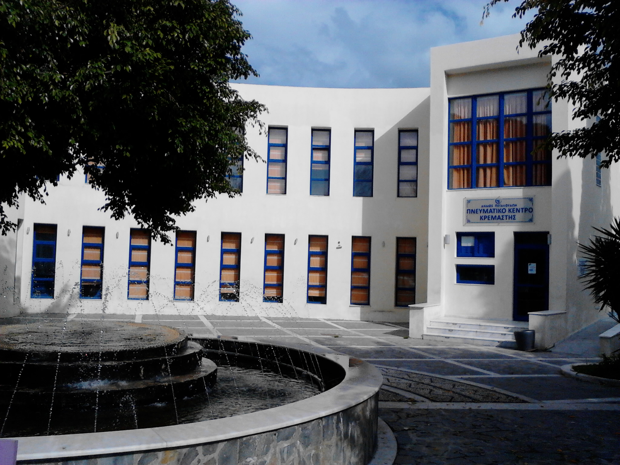 Το κτίριο που στεγάζει το πνευματικό κέντρο της Κρεμαστής